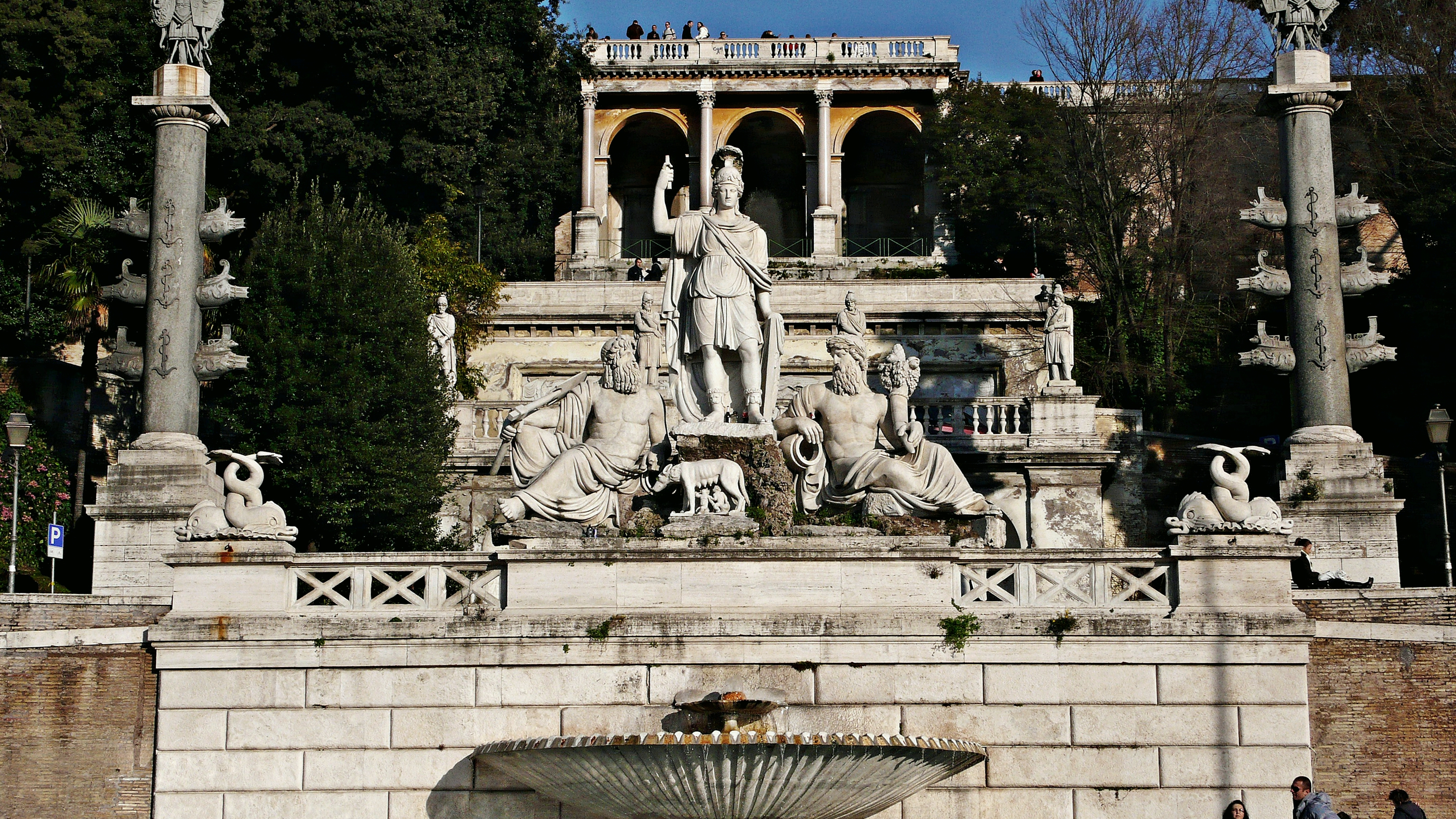 roma